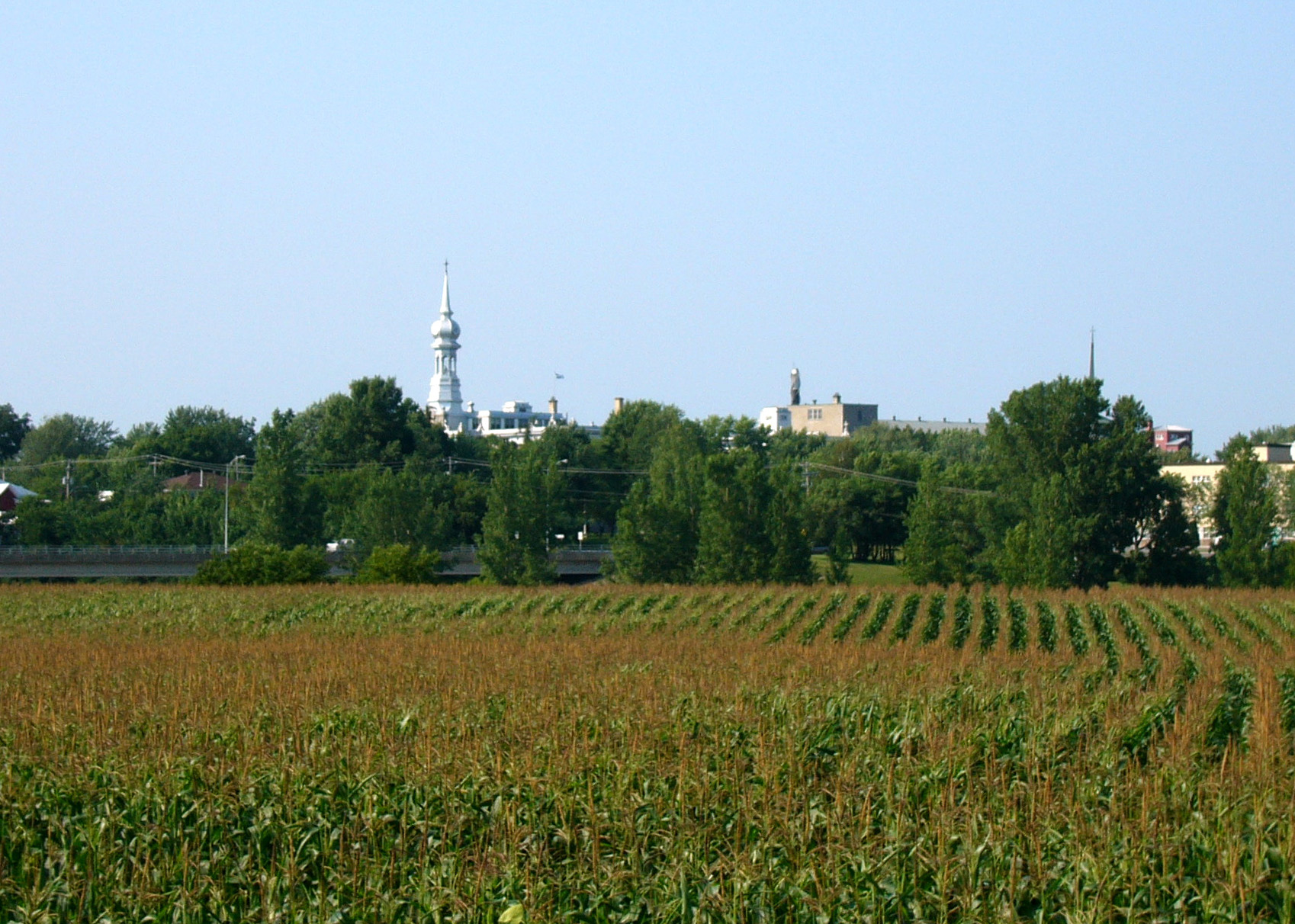 Nicolet, Québec, vue à partir de l'ouest de la rivière